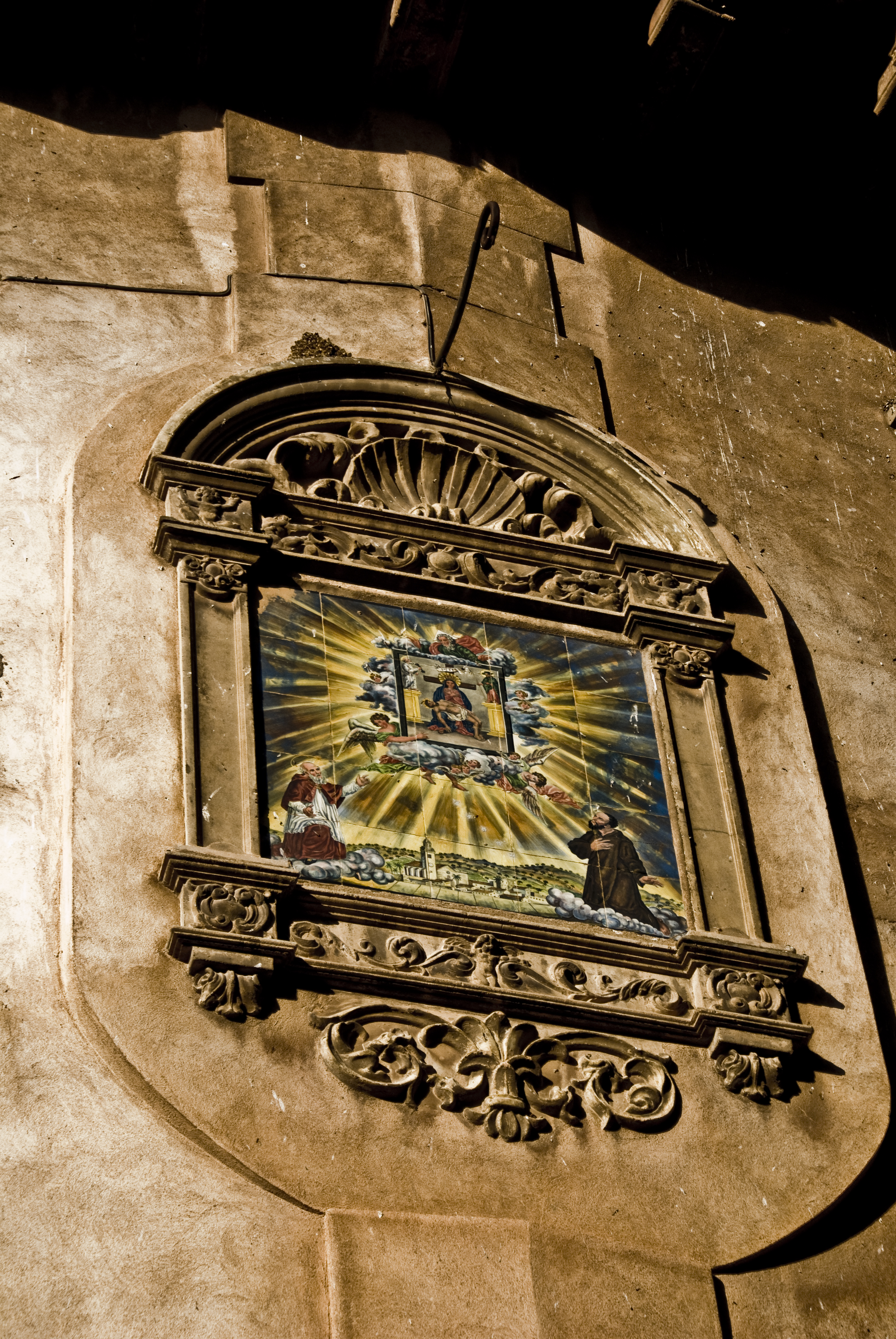 Detall de la façana principal de la Casa Social de Puçol(Valencia).